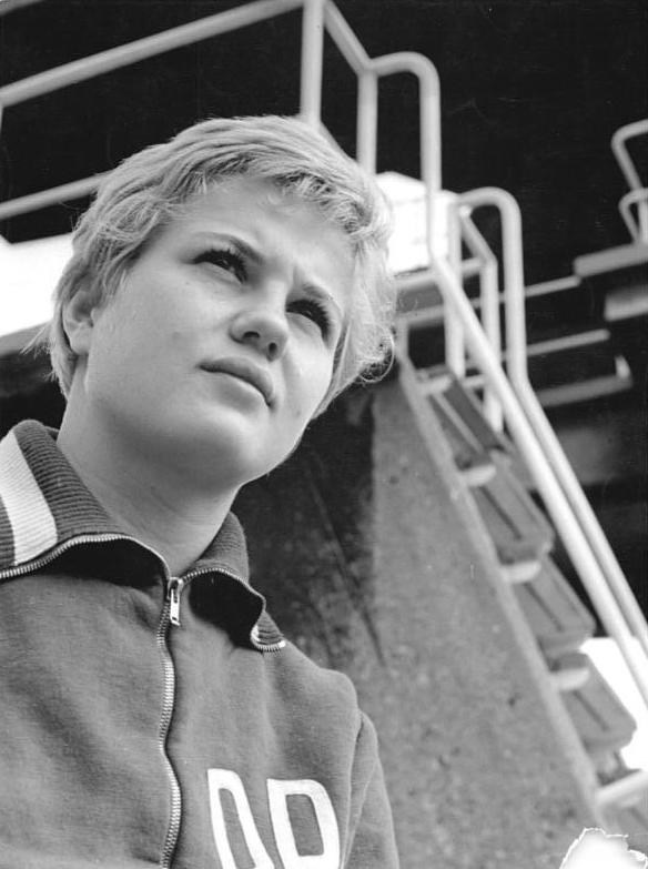 Zentralbild-Leipzig-Schaar FS-Kt 15.8.1962 Leipzig: Ingrid Krämer zum feigen Mord an Hauptmann Rudi Arnstadt: Während die übergroße Mehrheit der Menschen auf der ganzen Welt sich für die Erhaltung des Friedens einsetzt, während wir europäischen Schwimmsportler uns hier in Leipzig zu den europäischen Schwimmmeisterschaften treffen, um im friedlichen Wettkampf unseren Sport auszuführen, erfahren wir voller Empörung von der neuen schweren Provokation der Bonner Ultras an der Staatsgrenze unserer Republik, vom Mord an Hauptmann Rudi Arnstadt. Wir Schwimmsportler in Leipzig hätten gern erfahren, daß die Westdeutschen Schwimmer doch noch an den Wettkämpfen teilnehmen können, stattdessen hören wir von diesem neuen gefährlichen Gewaltakt Bonns, den ich aufs schärfste verurteile.